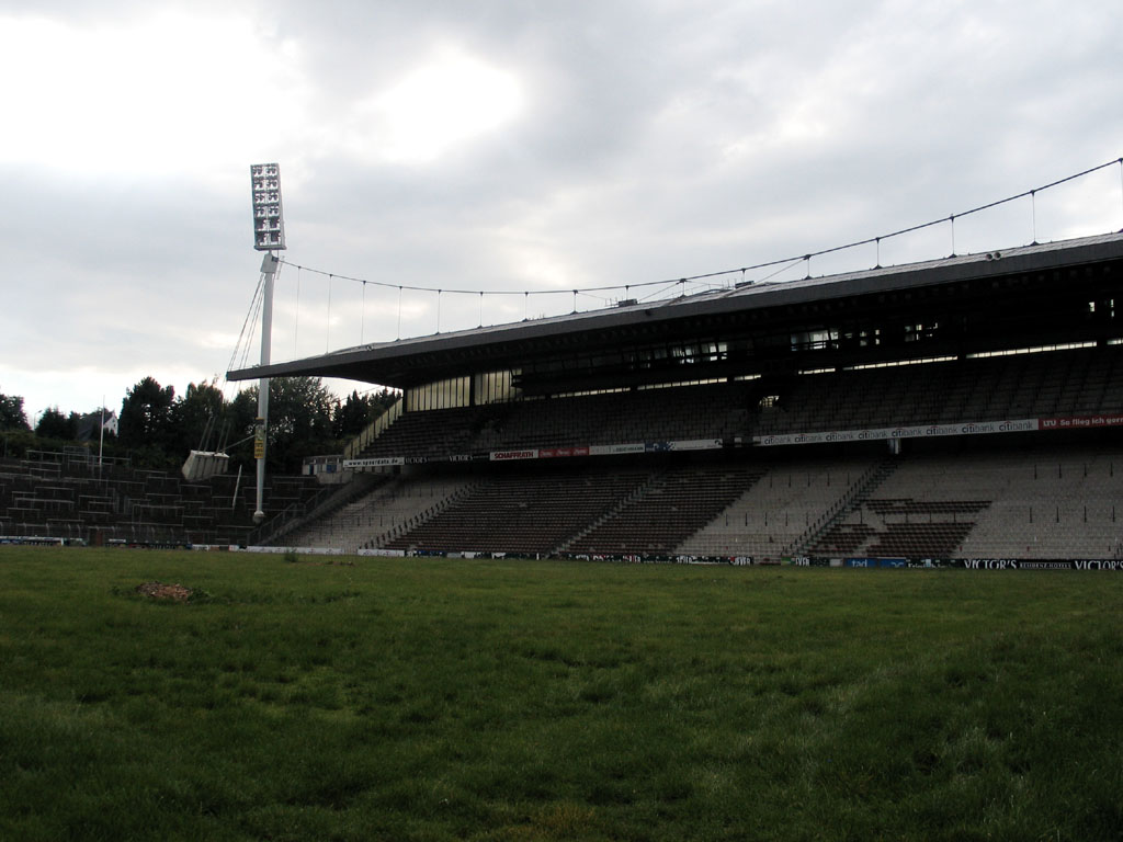 Westtribüne des Bökelbergstadions im Oktober 2005.